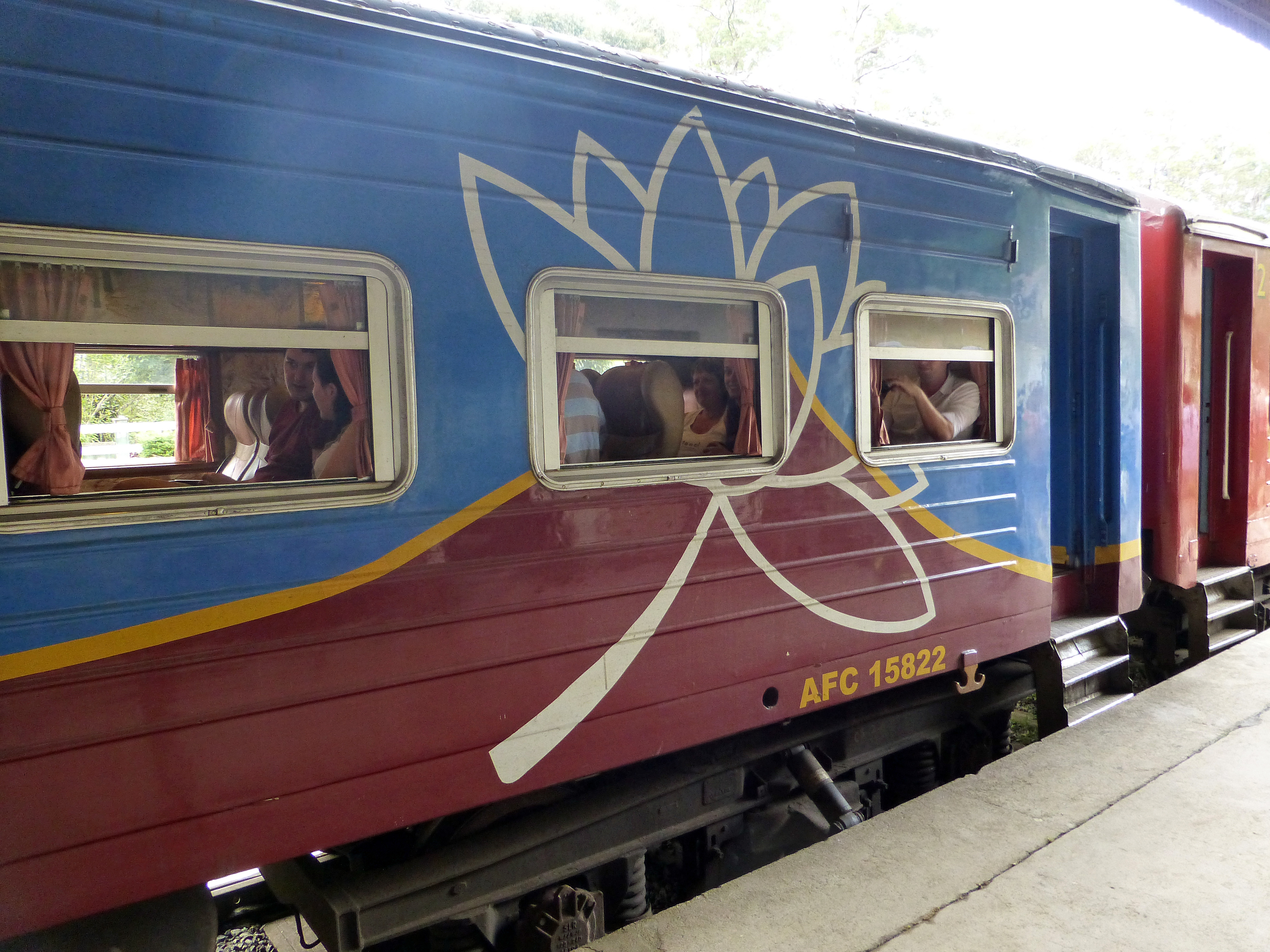 Sri Lanka, Province d'Uva : gare d'Ohiya